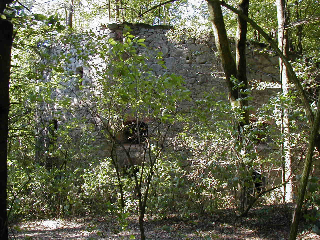 Linzer Turmlinie - Turm 15 Luitgarde Eigene Aufnahme am 24.09.2006